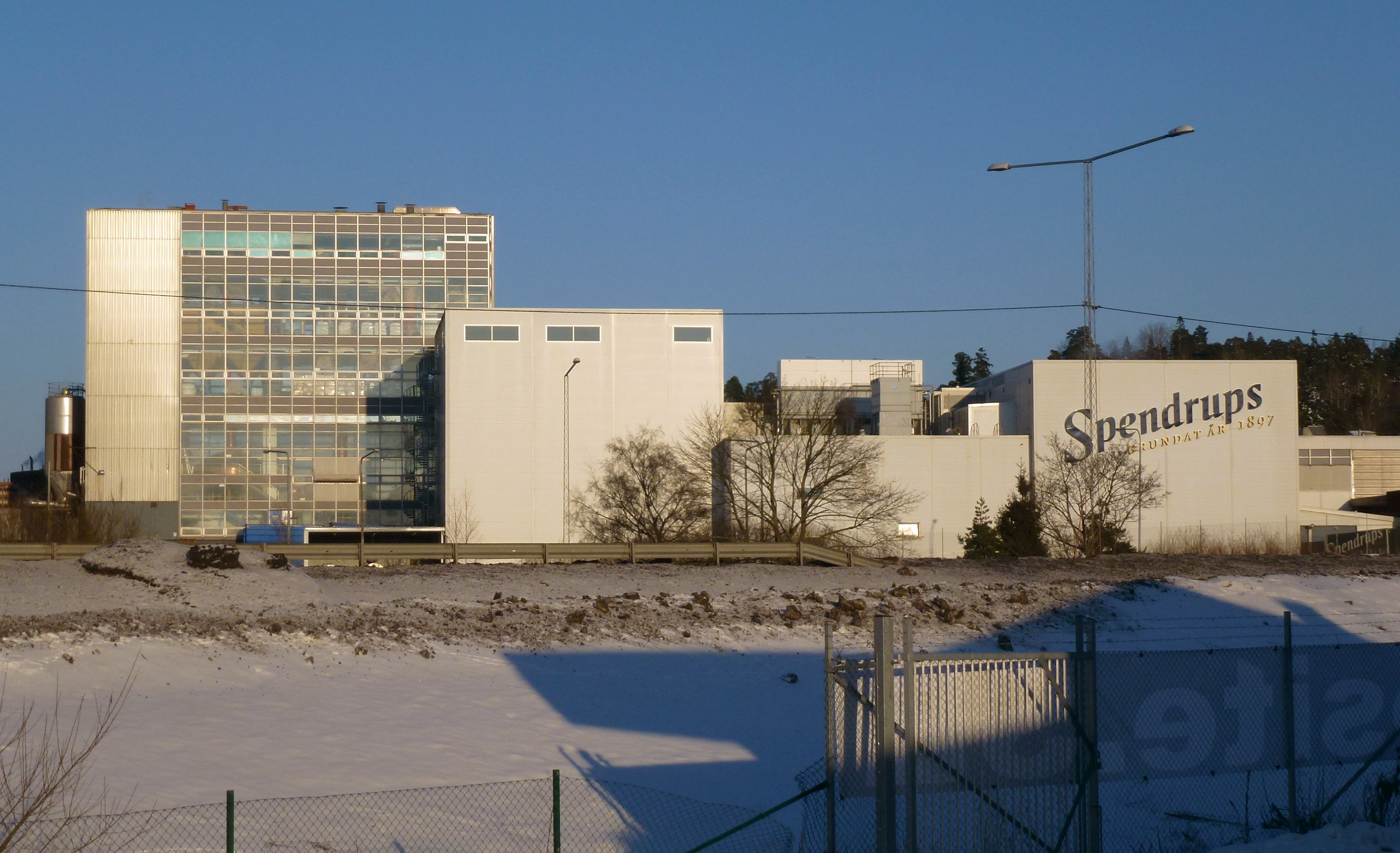 Spendrups Vårby bryggeri, fasad mot syd